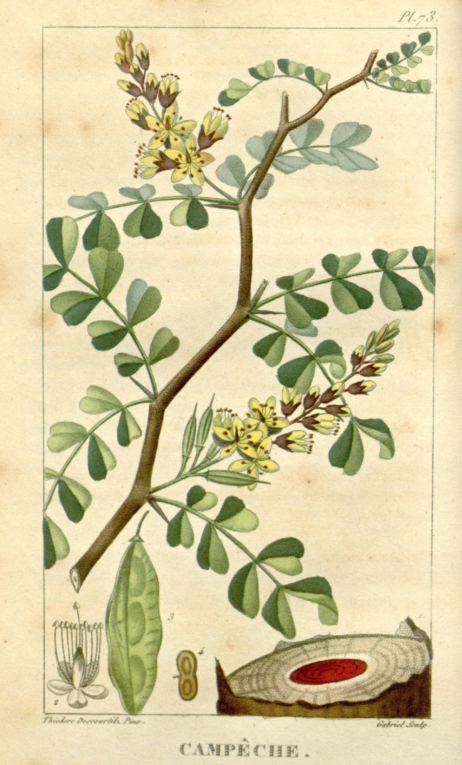 a/ 'M y=Ur . 4rirérrr/ * fruf^ . VXMVWVWY.